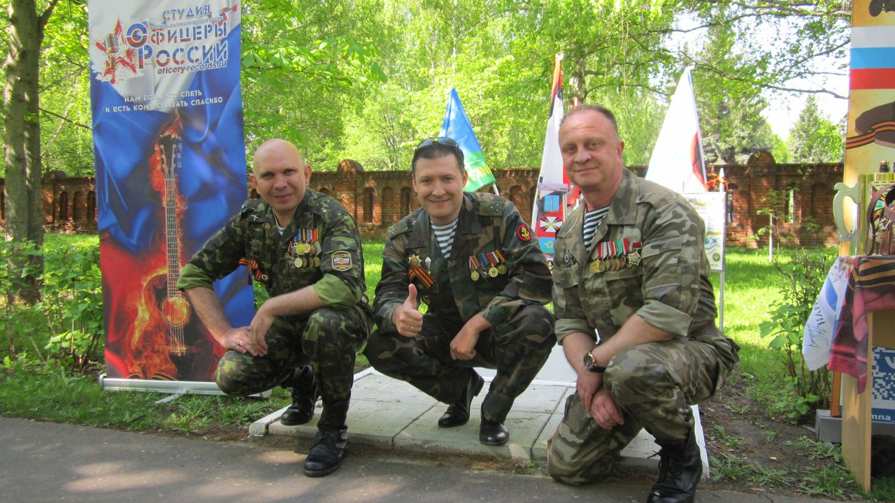 Авторы памятного знака